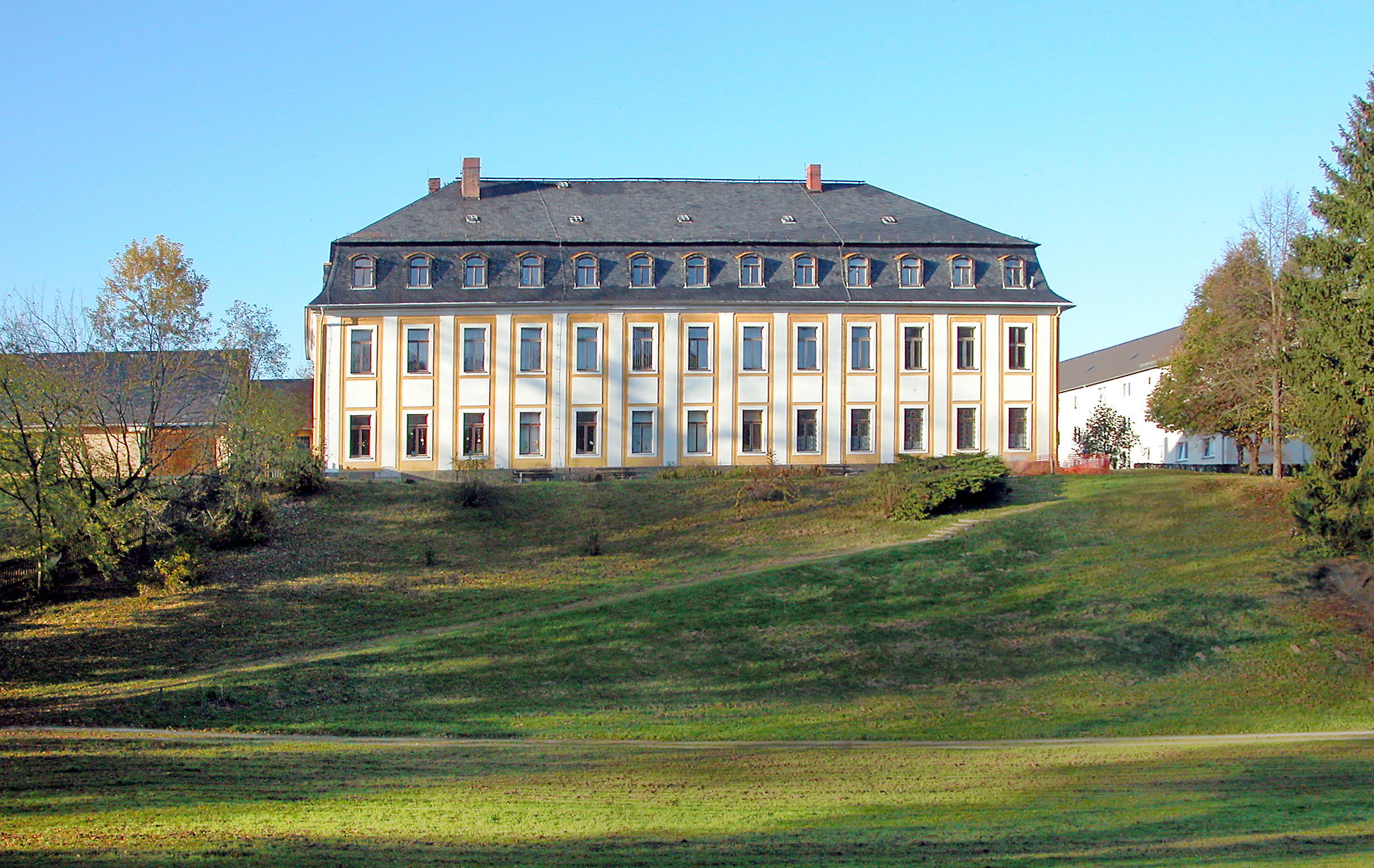 15.10.2007 08539 Leubnitz (Rosenbach), Am Park 1 (GMP: 50.515378,12.022288): Schloß, 1794 unter Heinrich Wilhelm von Kospoth im spätbarock-frühklassizistischen Stil errichtet. In der DDR Schule und Kindergarten. Heute Sitz der Gemeindeverwaltung Rosenbach. Seit 2003 betreibt ein Förderverein hier AusteIlungen und Konzerte. Sicht vom Park von Süden. [DSCN30687.TIF]20071015710DR.JPG(c)Blobelt